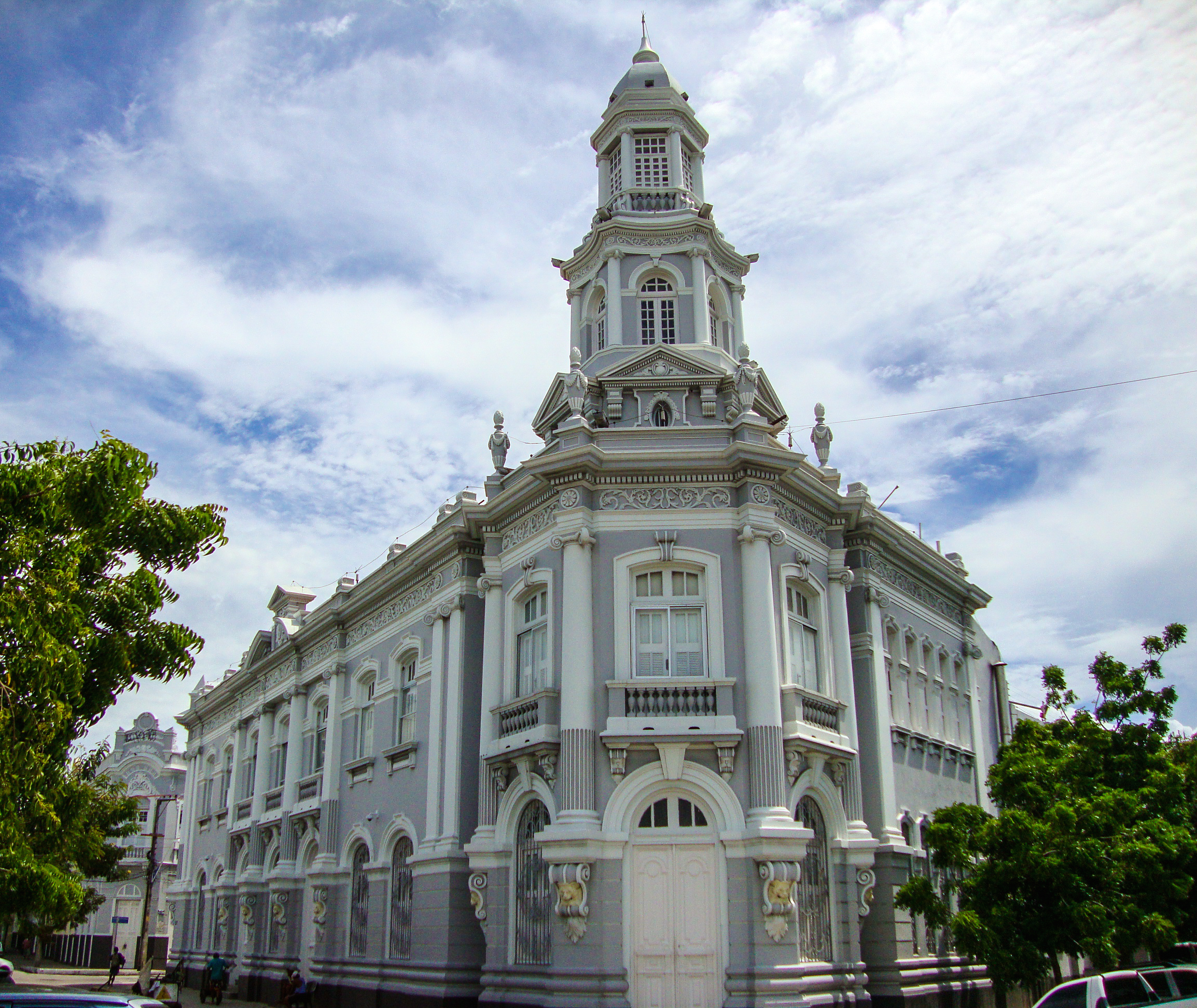 Secretaria Estadual da Fazenda, em Fortaleza, Brasil.